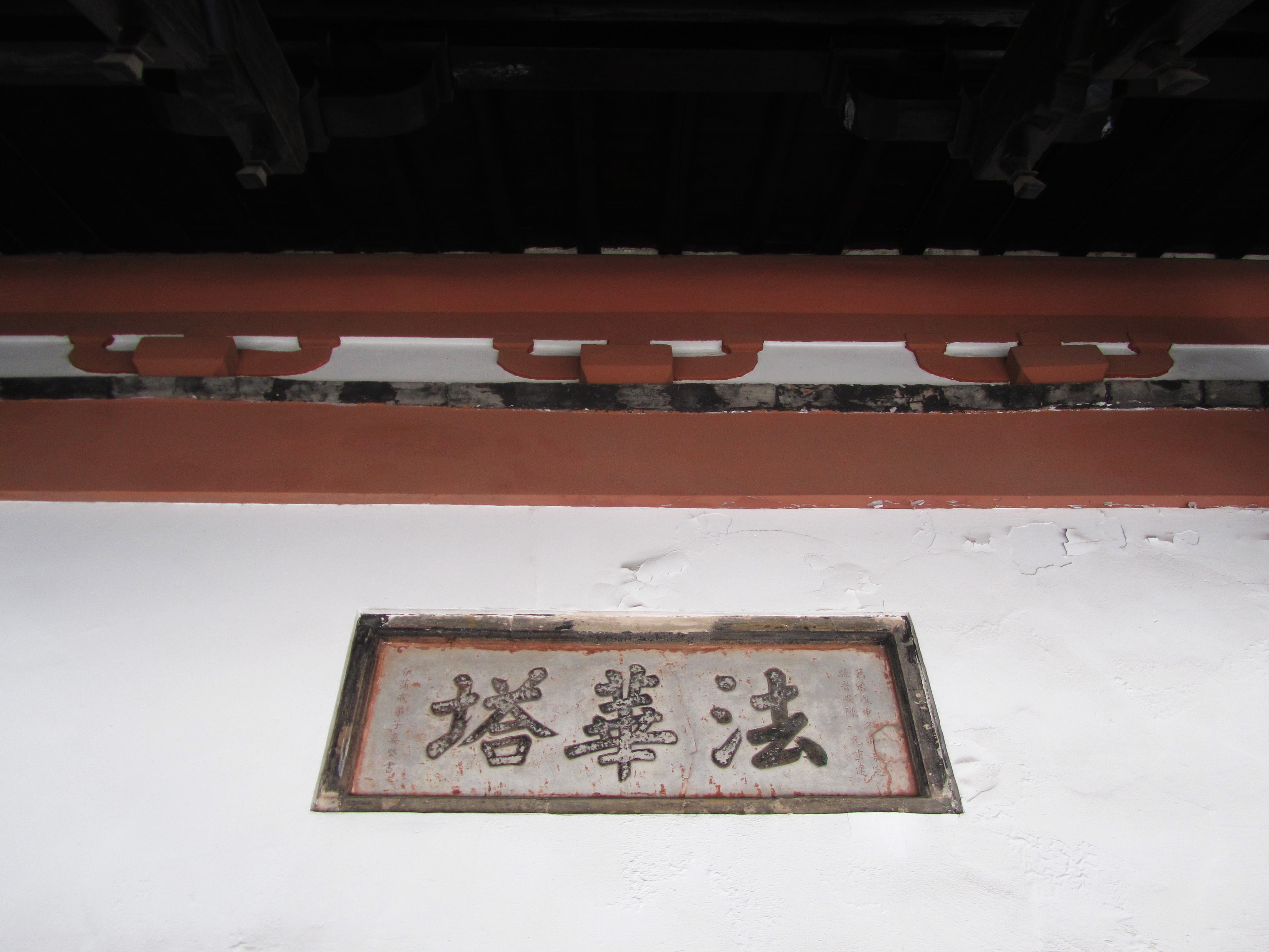 嘉定法华塔塔身底层匾额，上题“万历戊申冬知嘉定县晋安陈一元重建，伊蒲戒弟子娄坚书。”